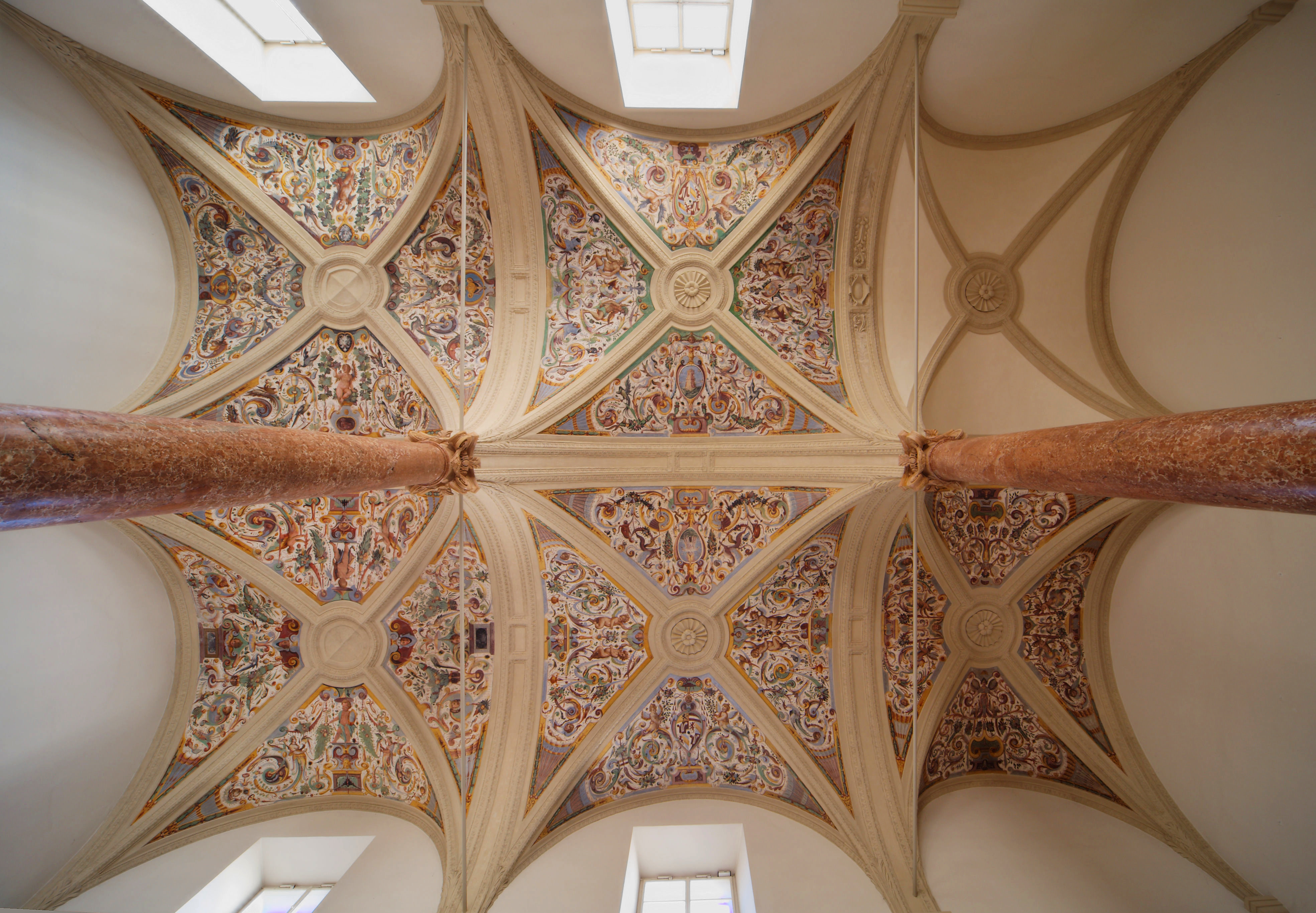 Sala Terrana in der Residenz Salzburg